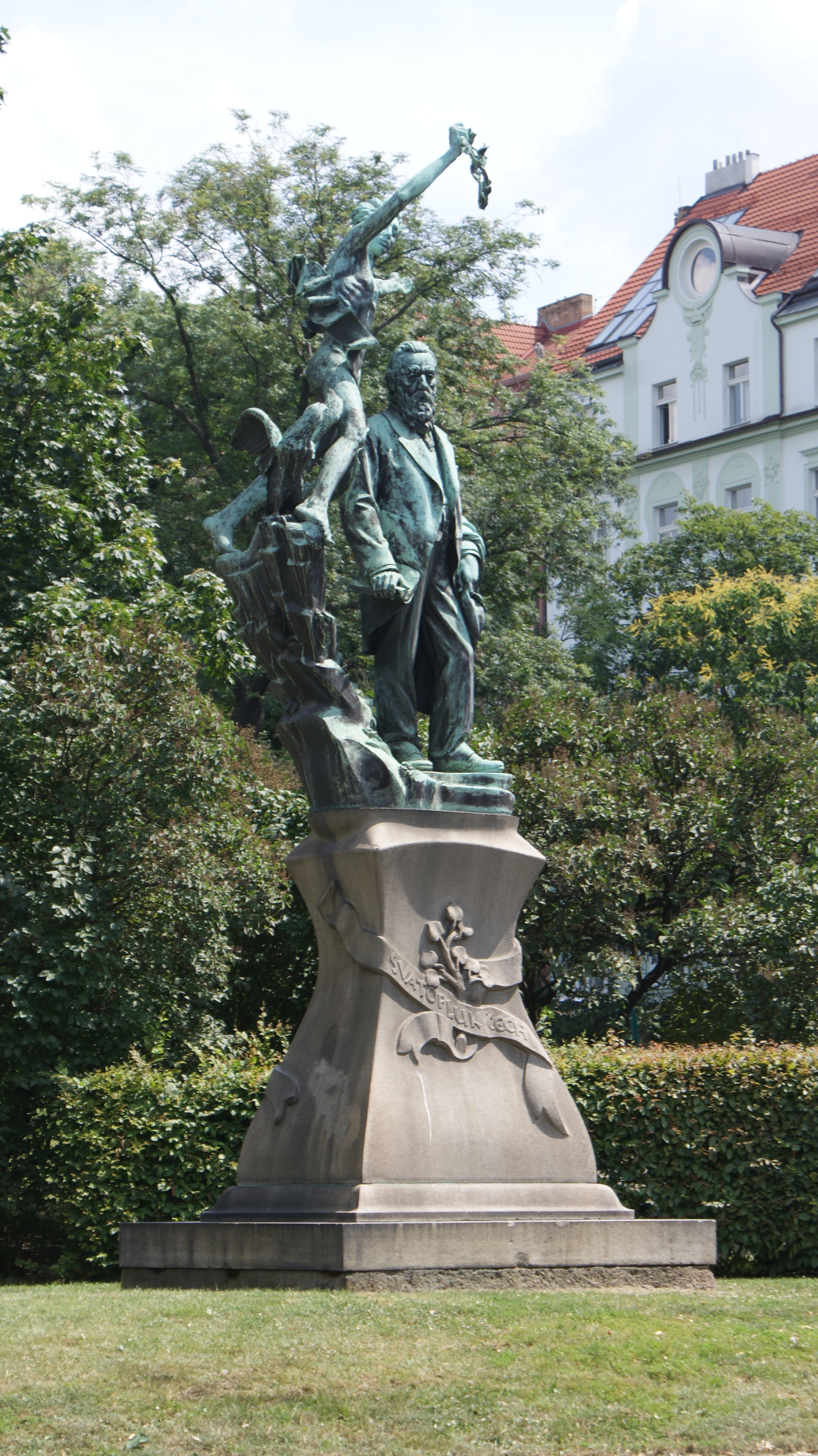 Svatopluk Čech pomník v Čechových sadech